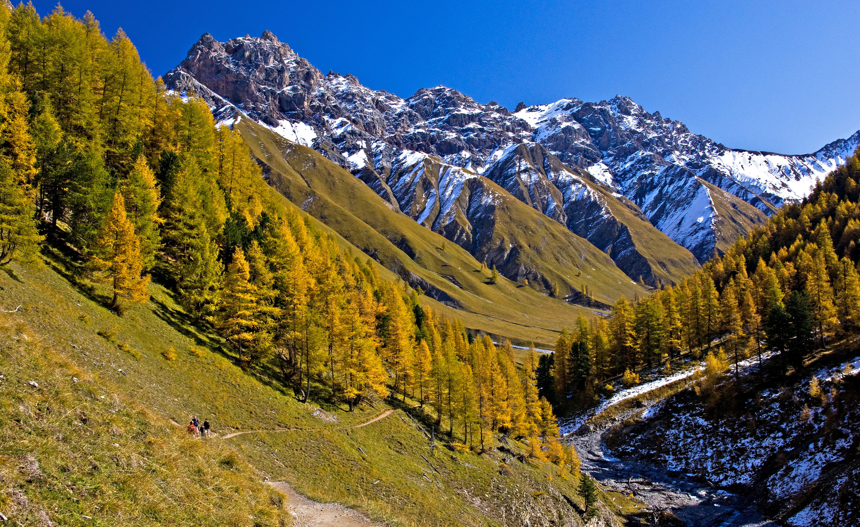 Parc Naziunal Svizzer, Val Trupchun